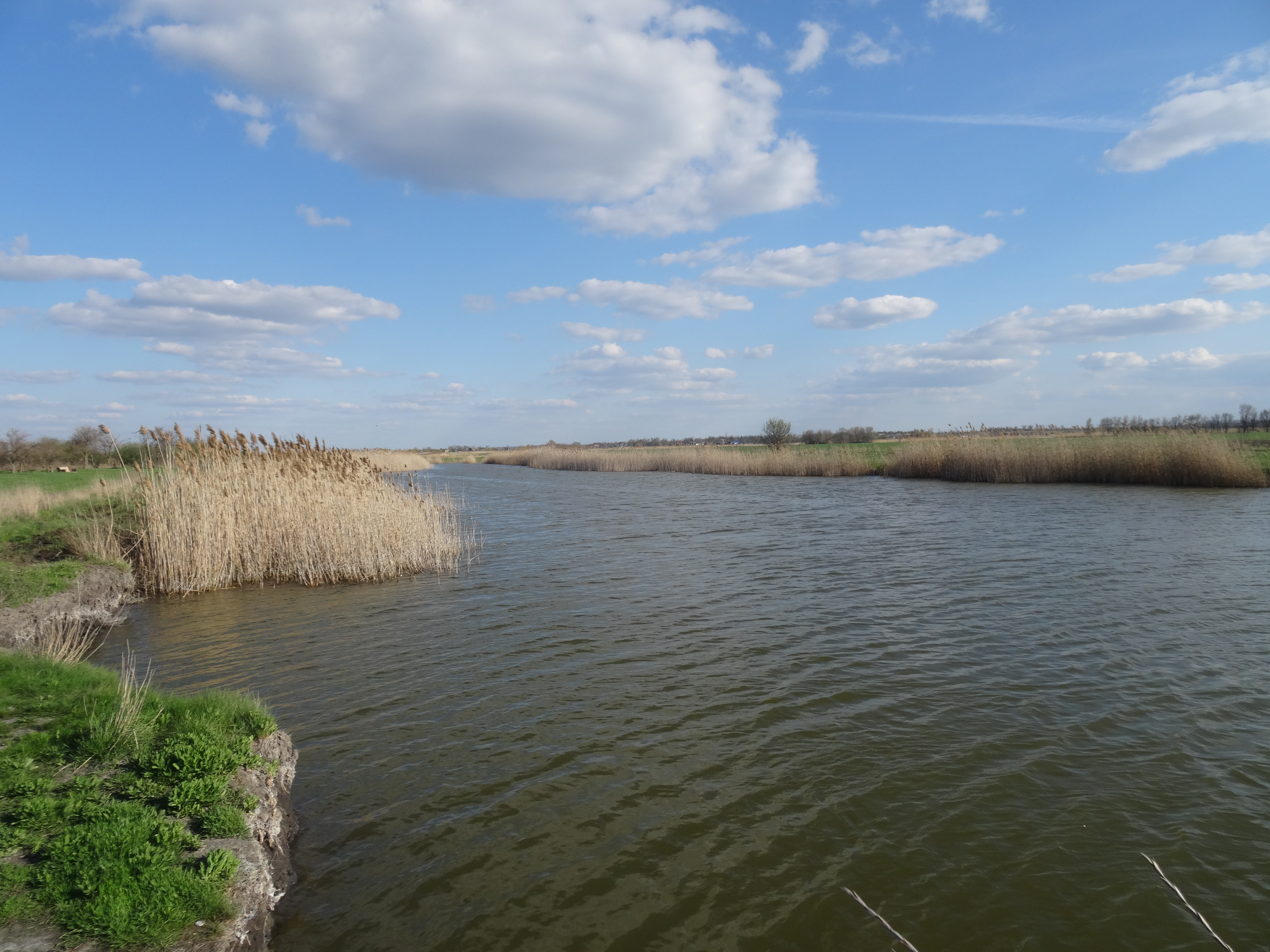 Азовский район, Пелёнкино озеро.